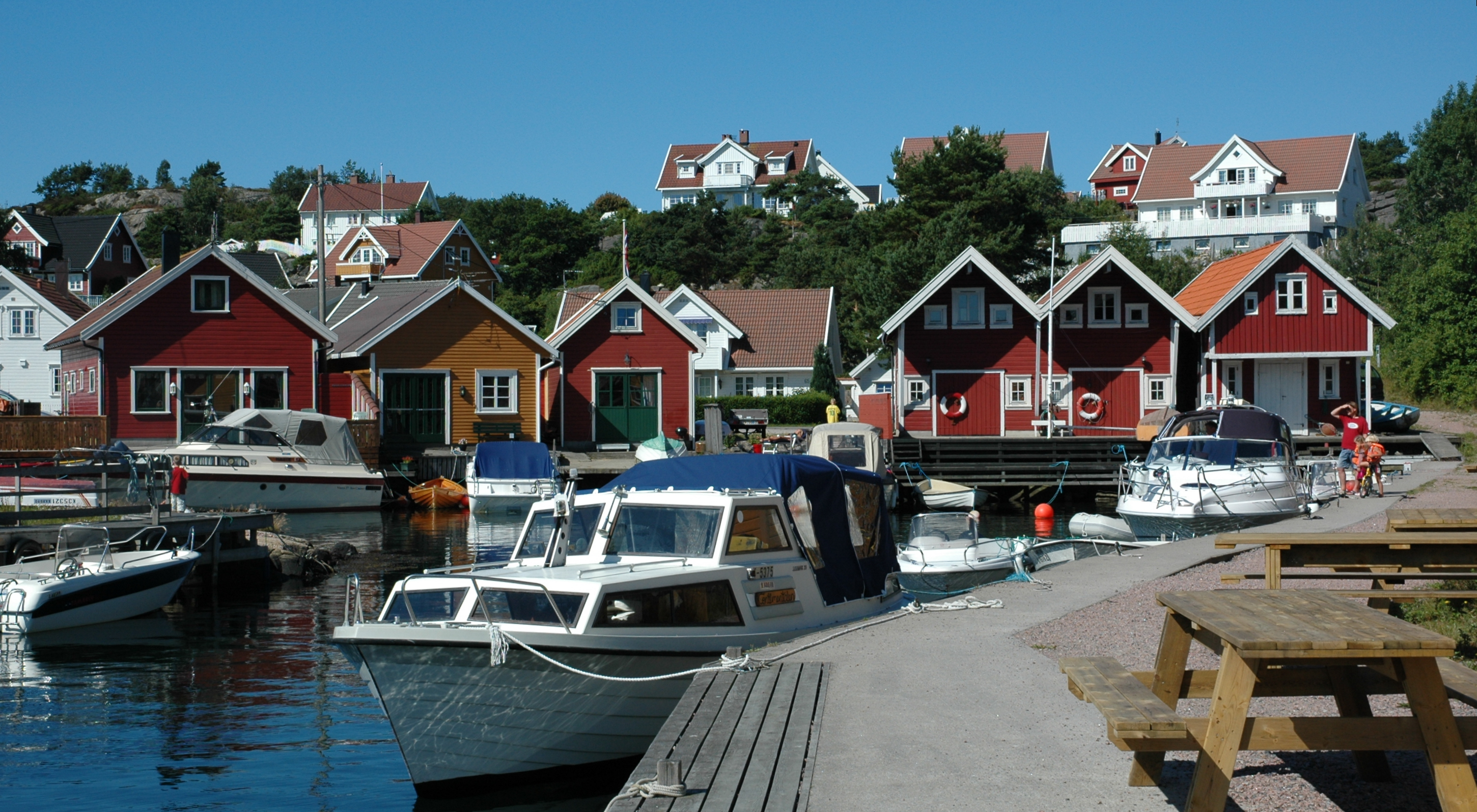 Bukta Paulen på Flekkerøya i Kristiansand. Mitt eige fotografi, juli 2006